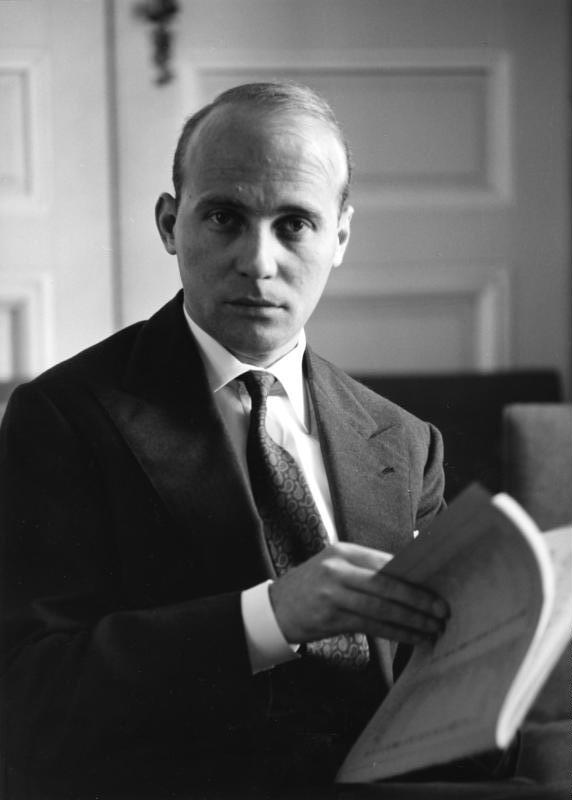 7.6.1960 Köln Schloss Brühl Eröffnung der Internationalen Meisterkurse der Staatl. Hochschule für Musik Hans Werner Henze, Komponist (GND 118549383)